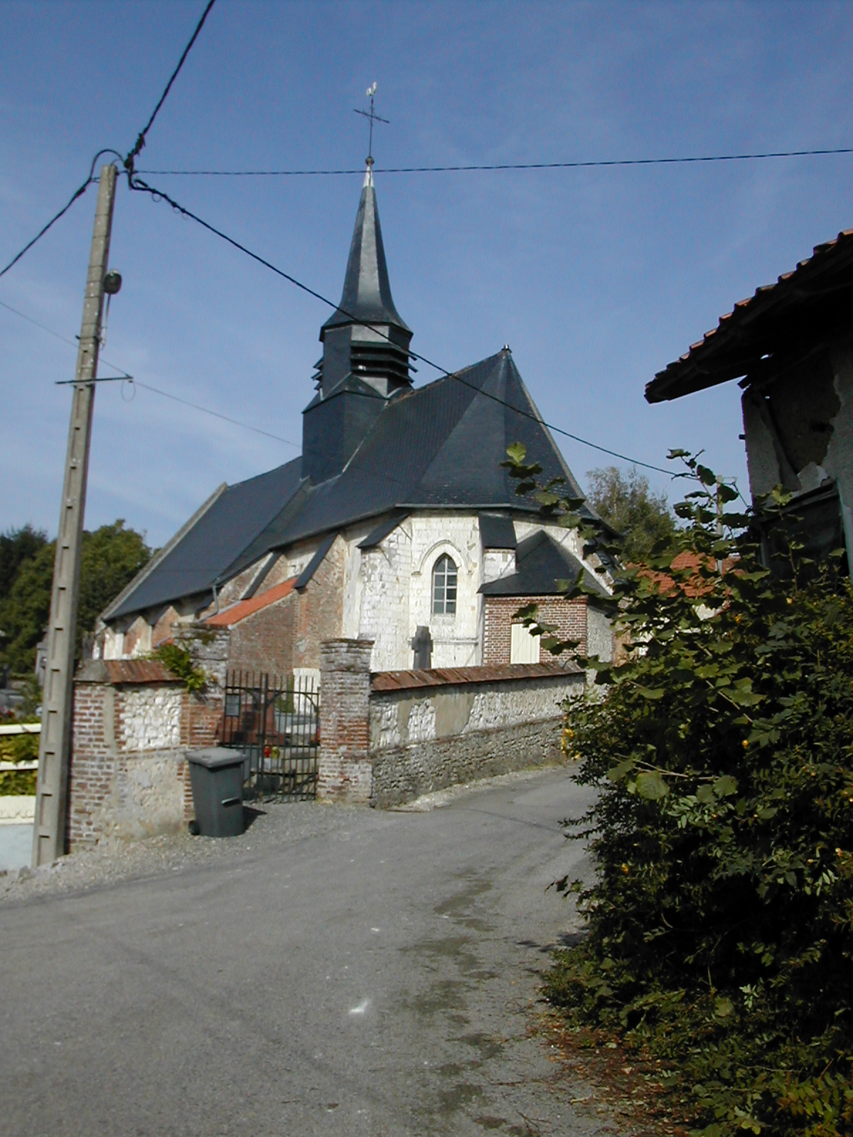 L'église de Marenla.